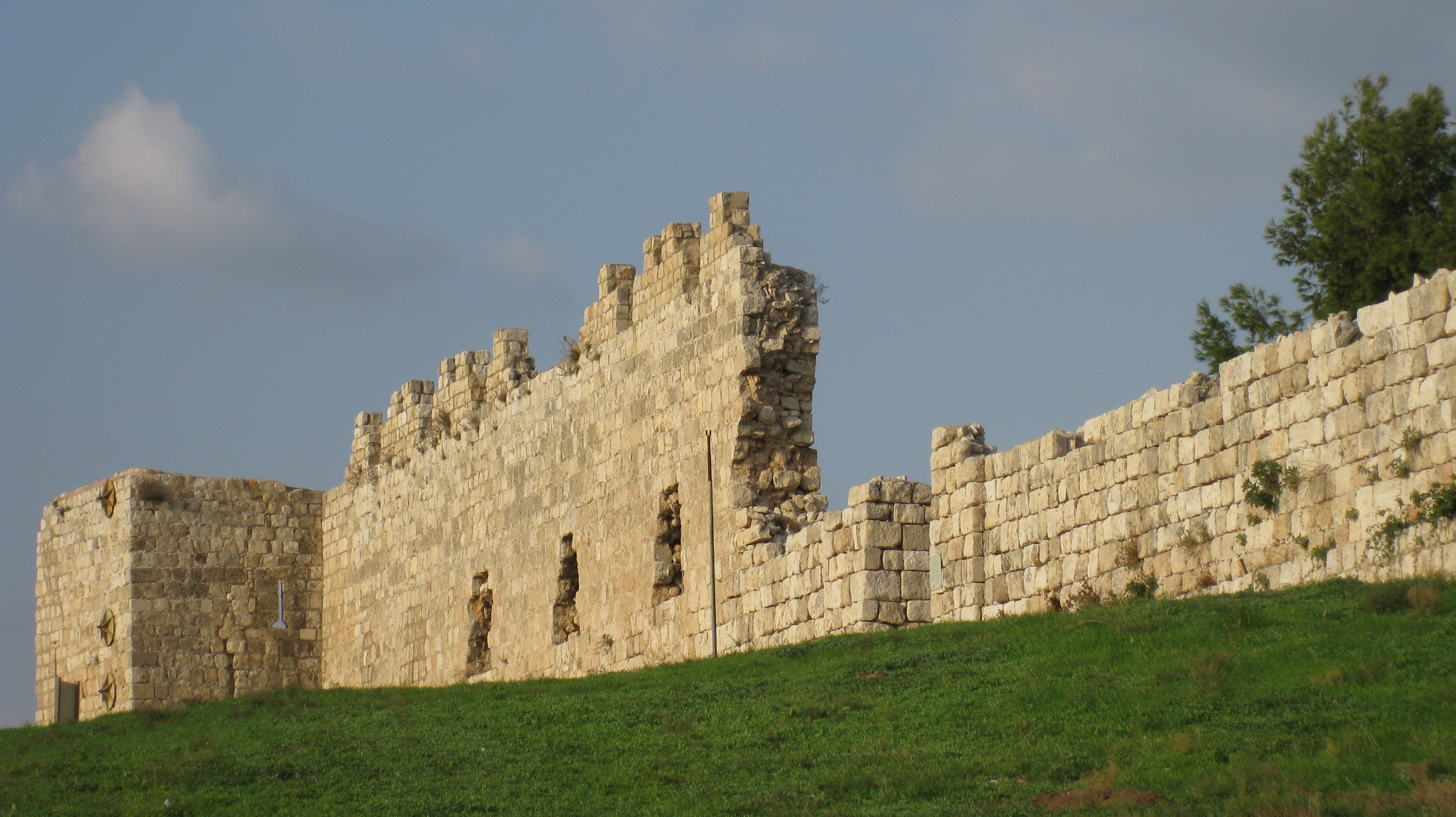 Tel Afek תל אפק גן לאומי ירקון